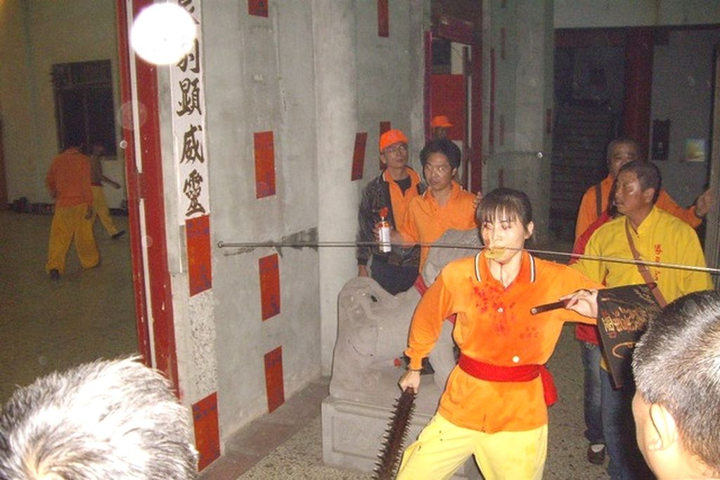 中文（台灣）: 乩童—用長銅針來貫穿臉頰而封口（俗稱灌口針）儀式。